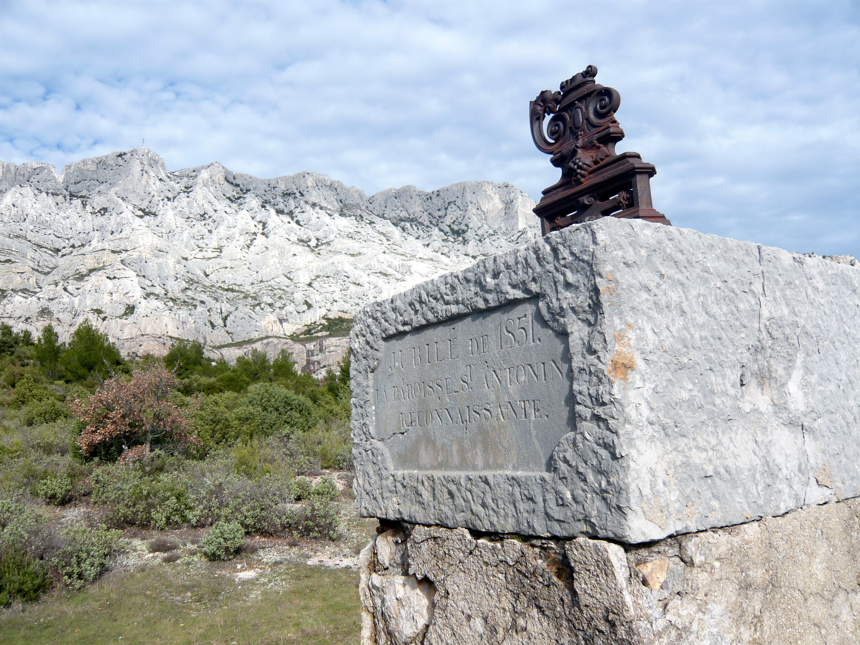 Stèle en mémoire du jubilé de 1851, Saint-Antonin-sur-Bayon, Bouches-du-Rhône (France). « Jubilé de 1851. La paroisse St Antonin Reconnaissante. »